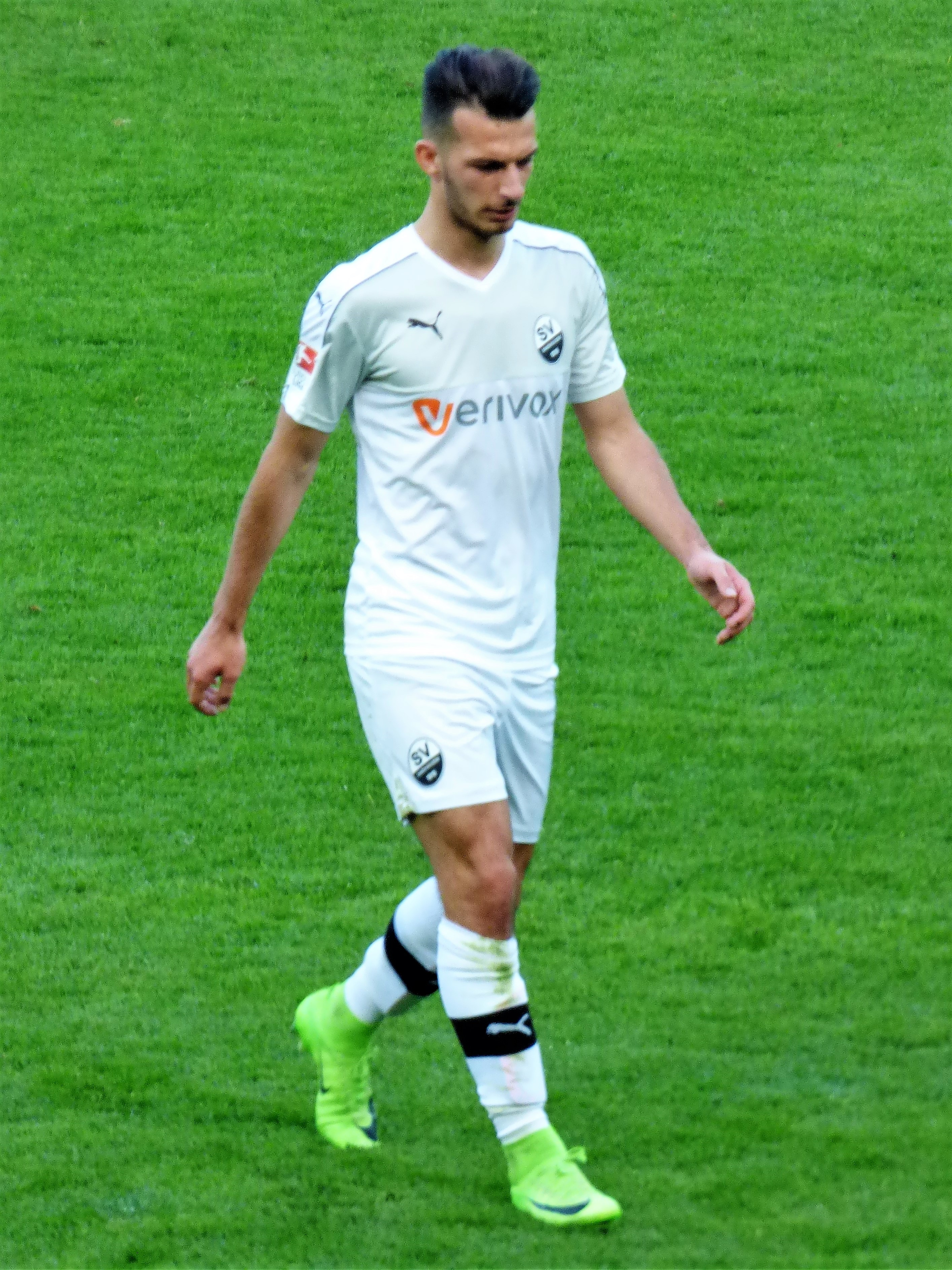 Leart Paqarada 2017